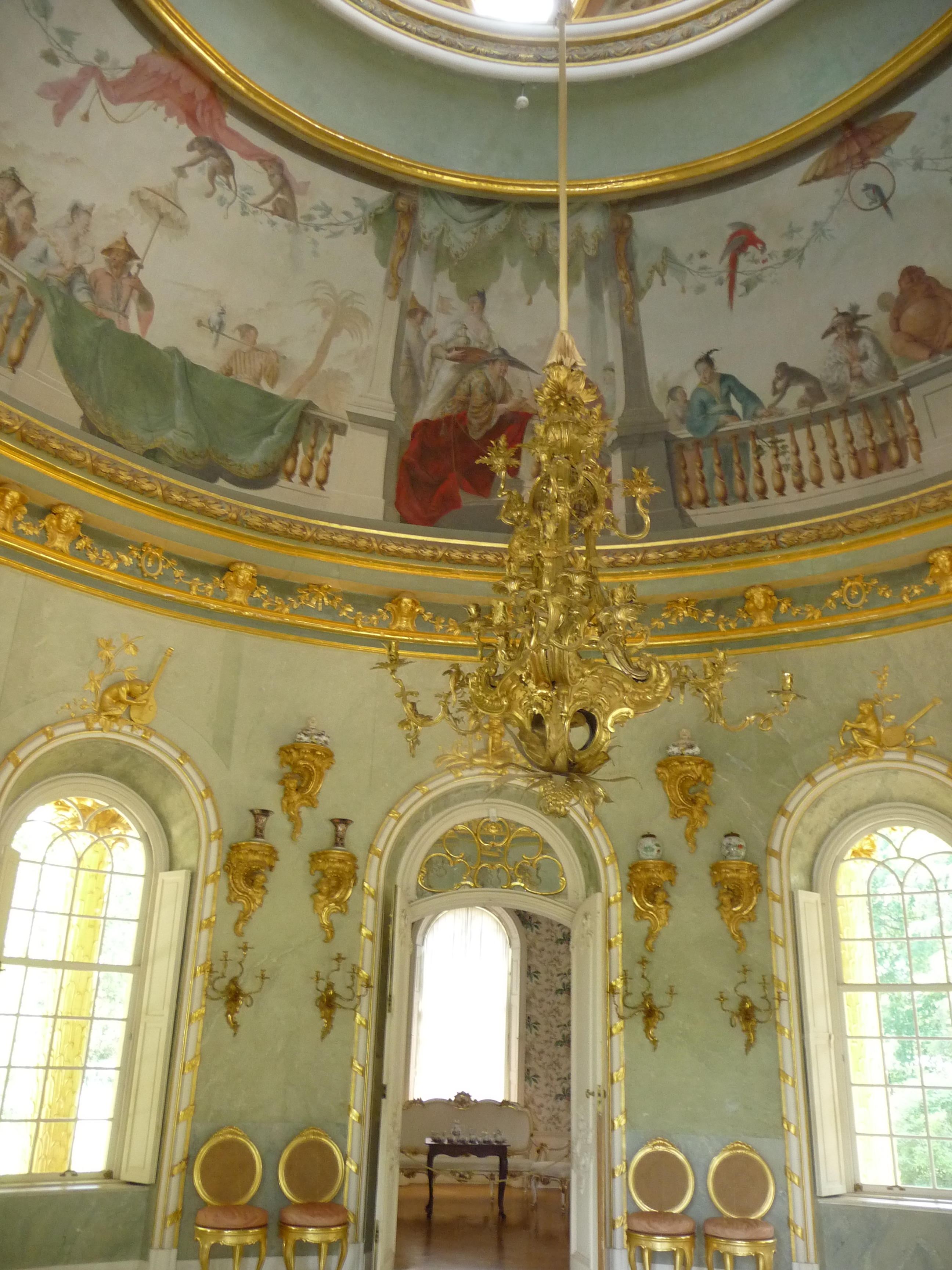 Innenansicht Chinesisches Teehaus in der Potsdamer Parkanlage Sanssouci